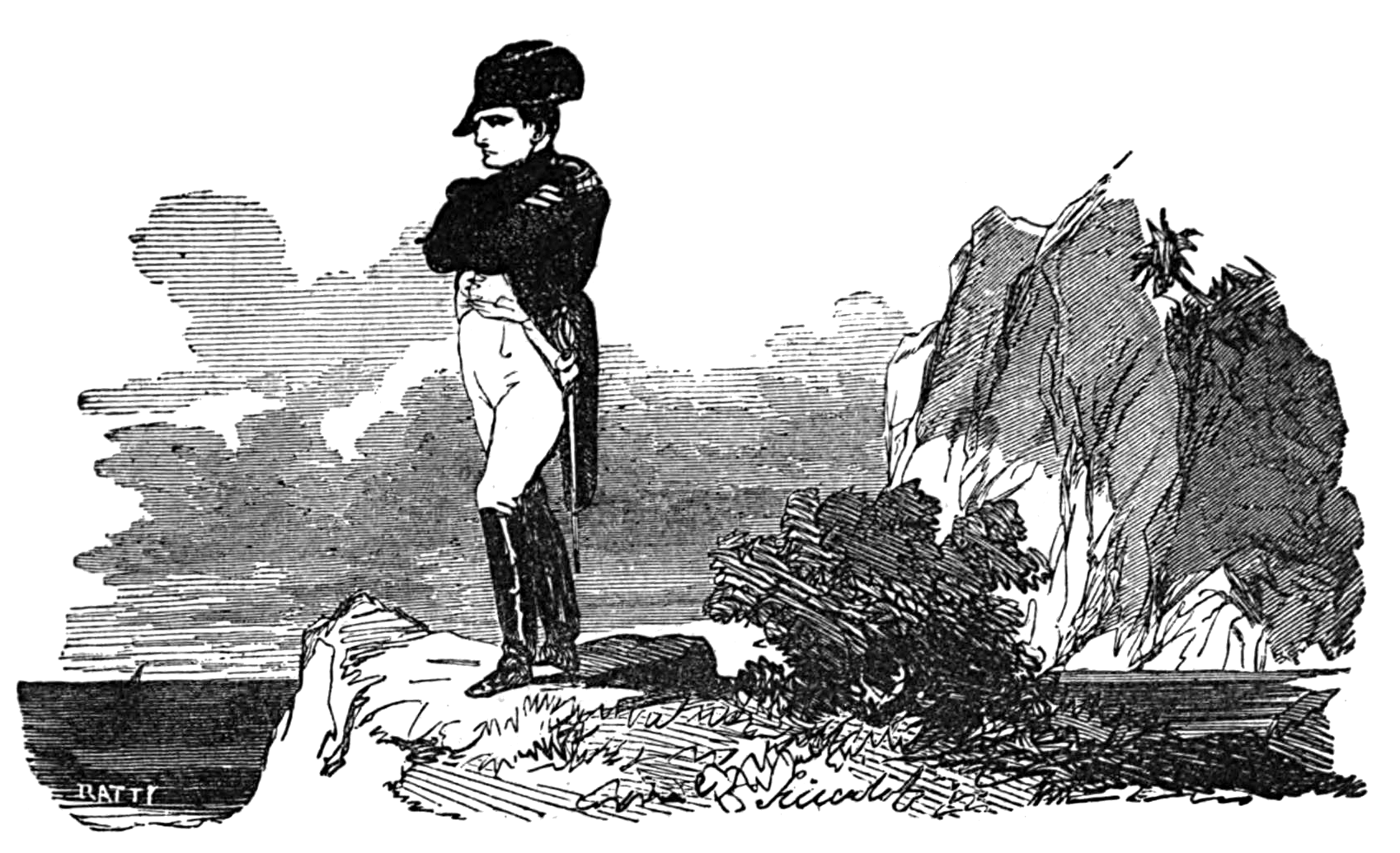 Illustrazione da Opere varie di Alessandro Manzoni. Milano, Fratelli Rechiedei, 1881.